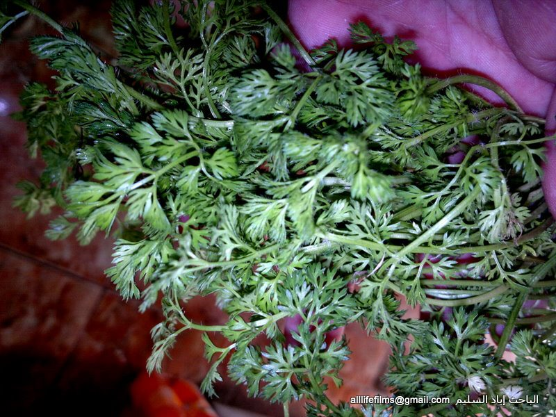 الحرتمنة